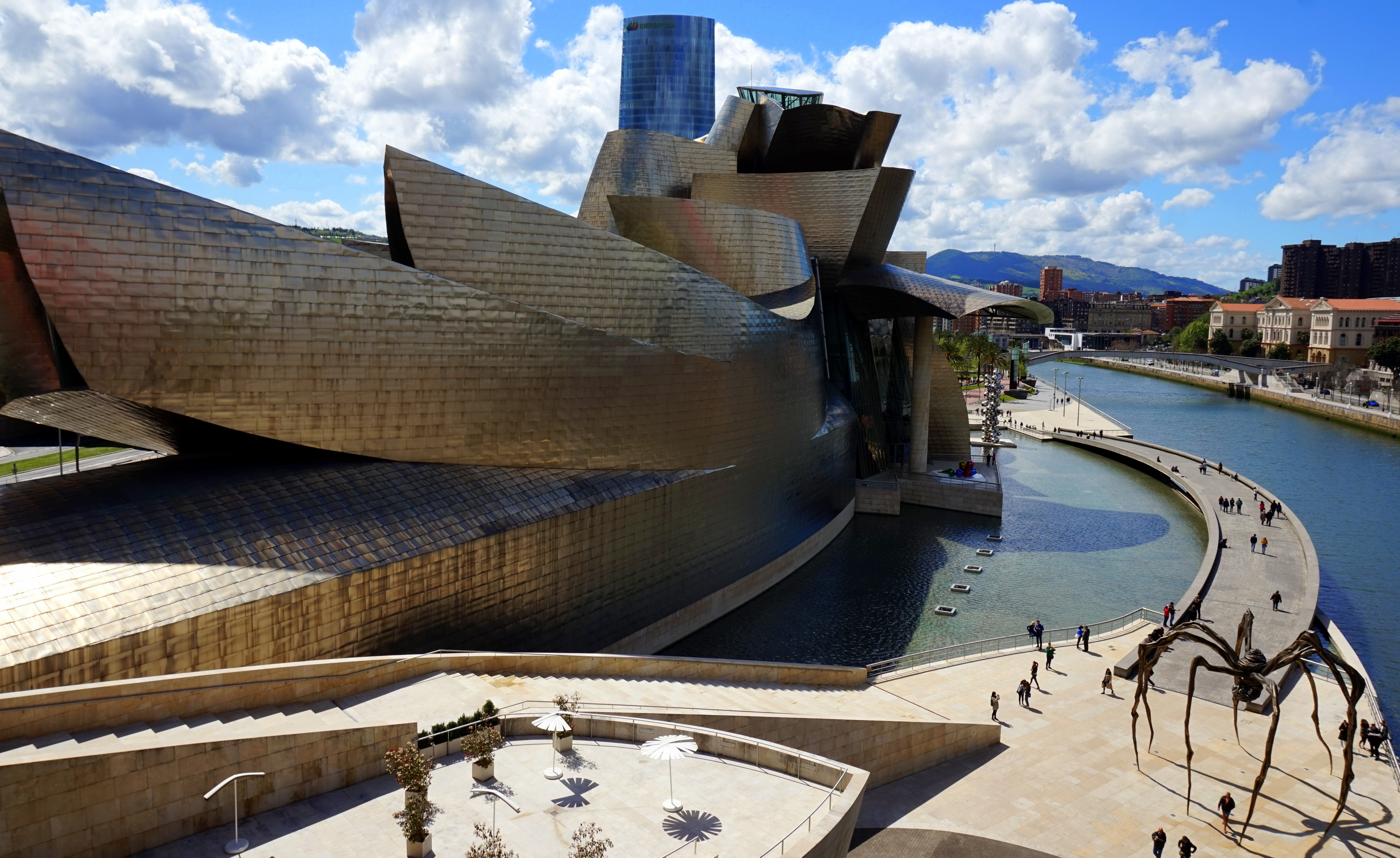 Guggenheim Museum, Bilbao